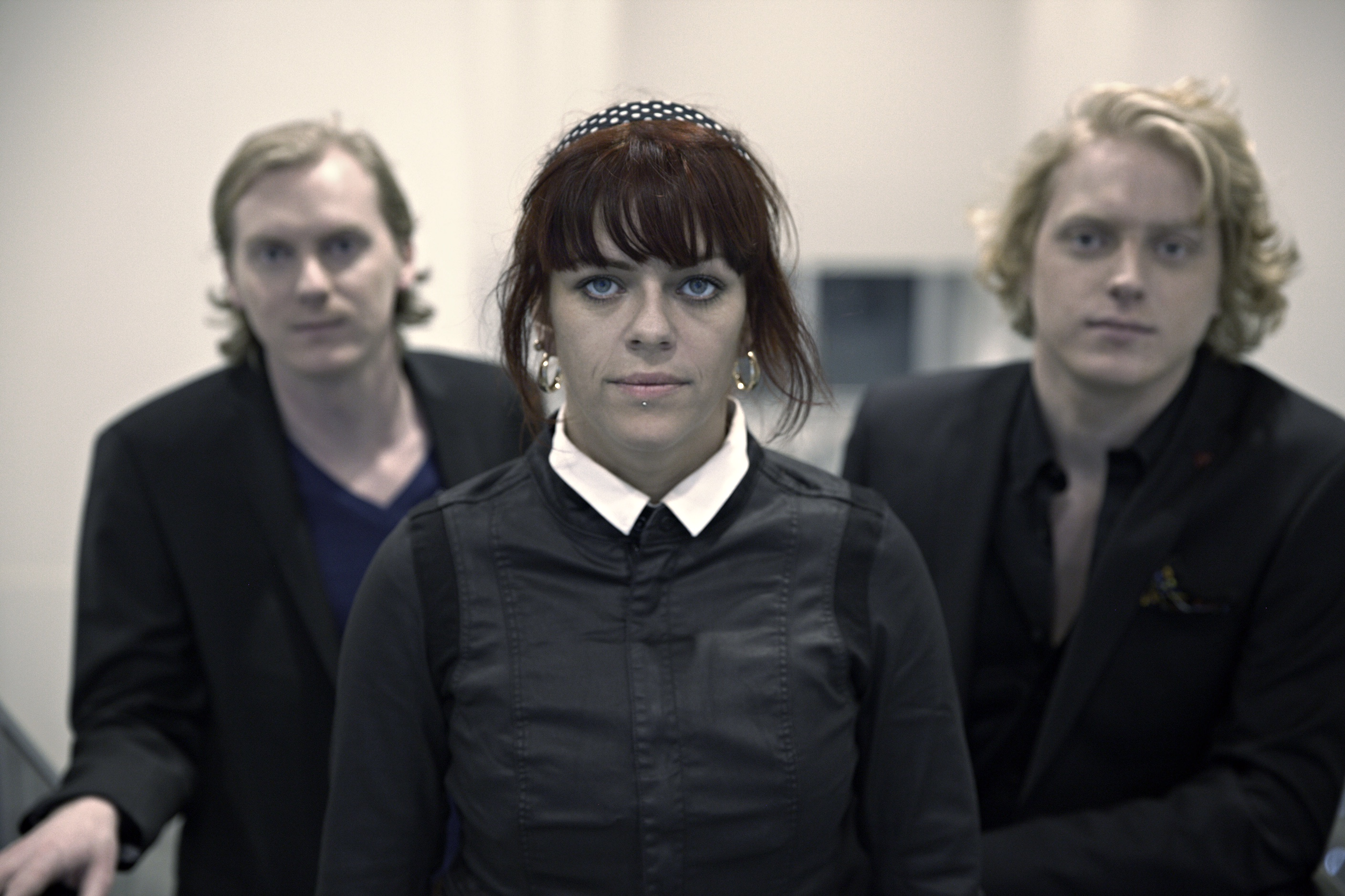 Twarres in nieuwe formatie